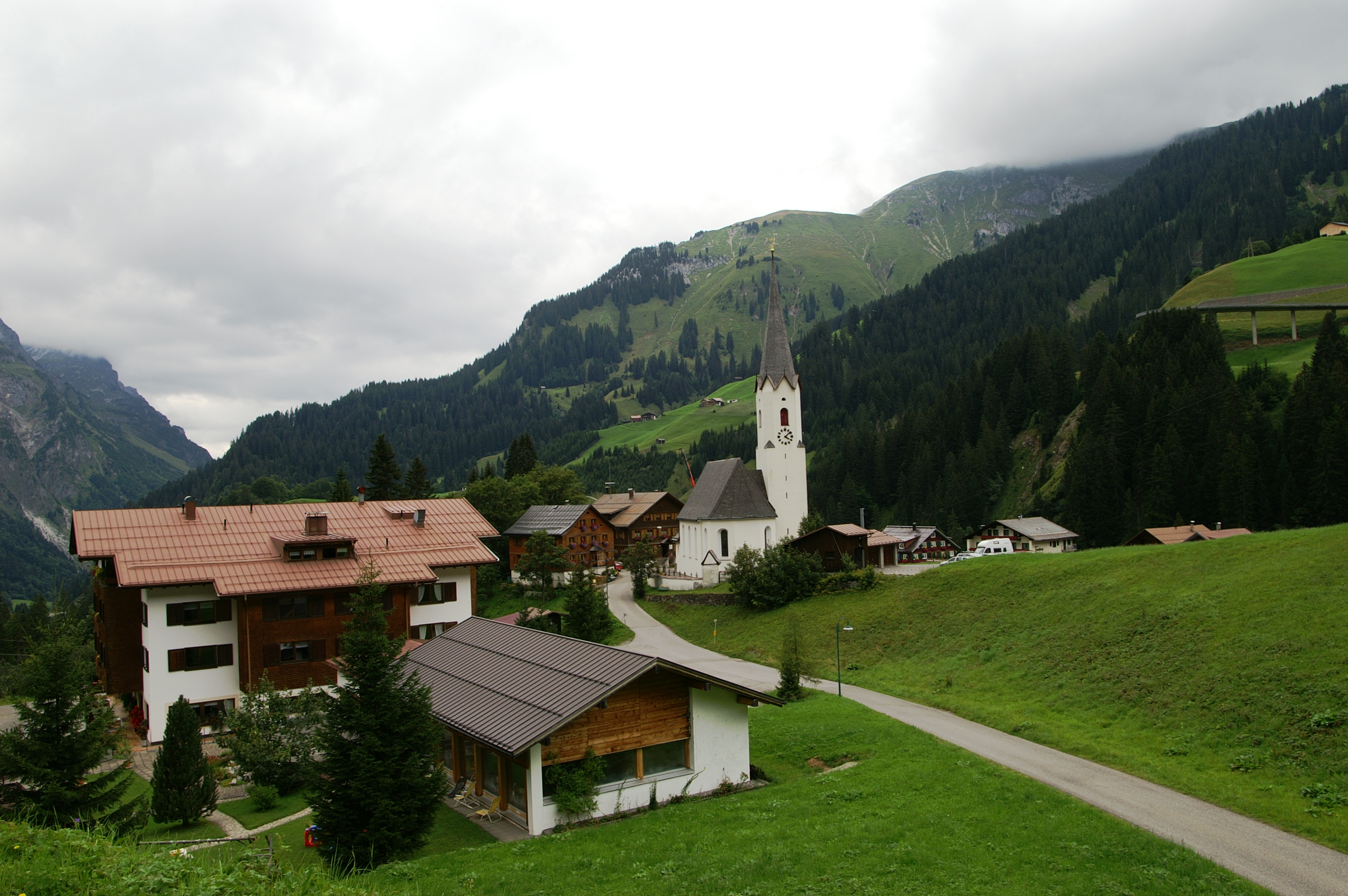 Pfarrkirche Mariä Himmelfahrt mit Ortsteil von Schröcken im Bregenzerwald , Vorarlberg